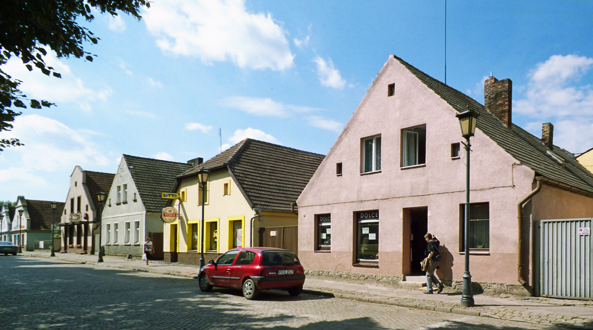 Chodzież, układ arch. miasta z XVIII/XIX w. - ul. Kościuszki IV-73/22/56.